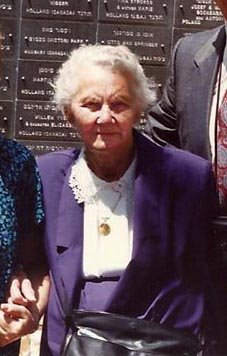 אמיליה סלודקובסקה במוסד יד ושם, ברחבת חסידי אומות העולם - 1985